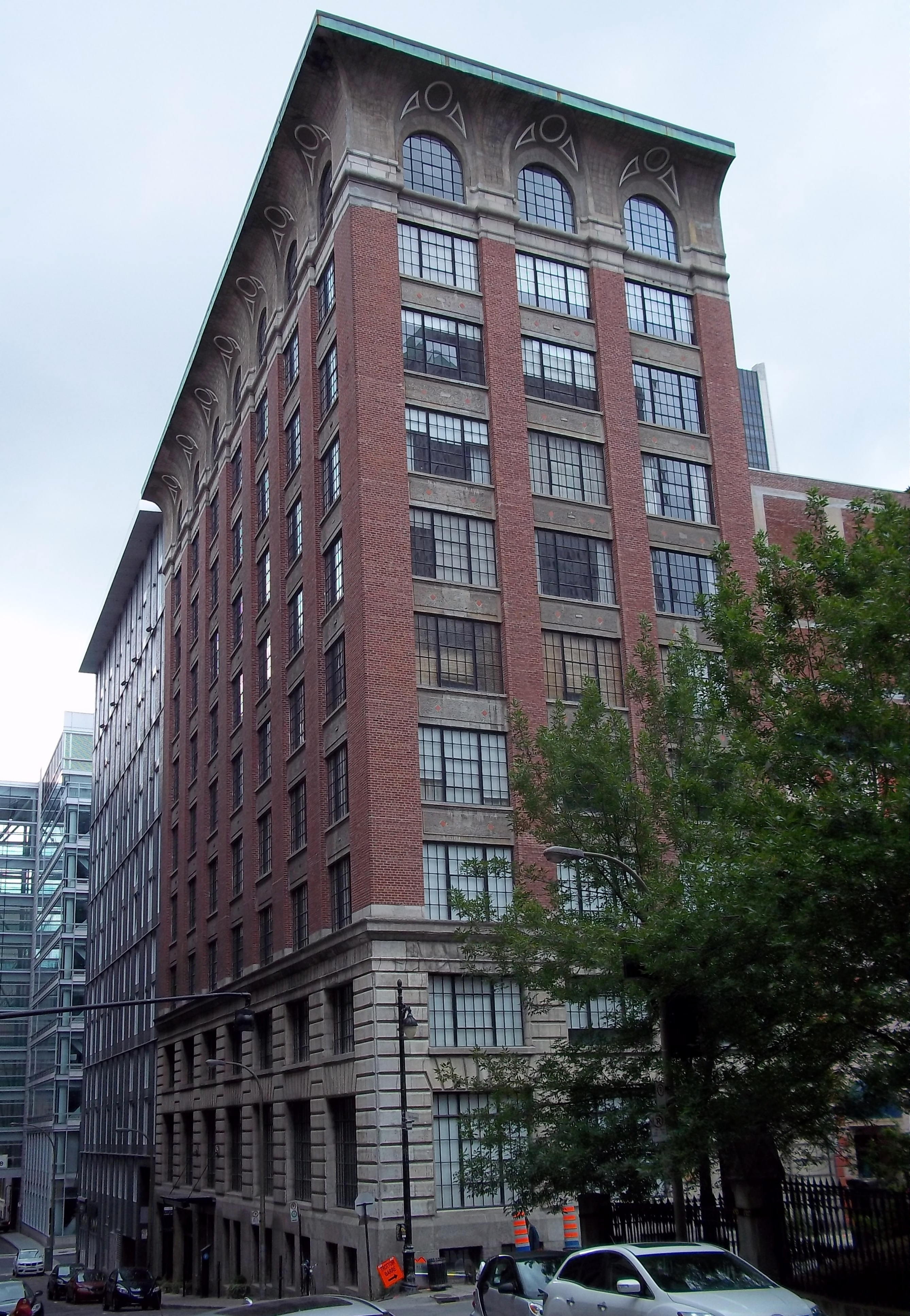 Édifice Unity, 454, rue De La Gauchetière Ouest, Montréal Répertoire du patrimoine culturel du Québec Grand répertoire du patrimoine bâti de Montréal